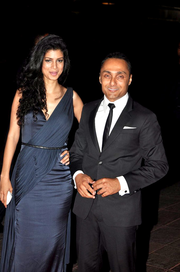 Tena Desae, Rahul Bose at Karan Johar's 40th birthday bash at Taj Lands End